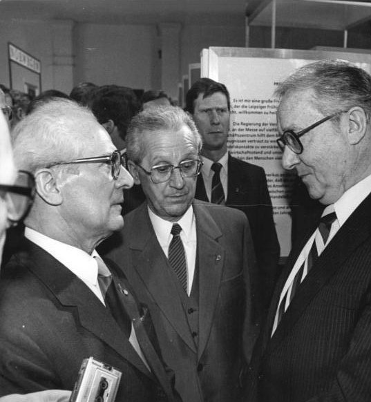 ADN-ZB Link 13.3.88 Leipzig: Frühjahrsmesse 88 Beim traditionellen Messerundgang unterhielten sich der Generalsekretär des ZK der SED und Vorsitzende des Staatsrates der DDR, Erich Honecker, und Außenhandelsminister Dr. Gerhard Beil am Stand der USA in Halle 16 mit dem Botschafter der Vereinigten Staaten, Francis J. Meehan (r.).